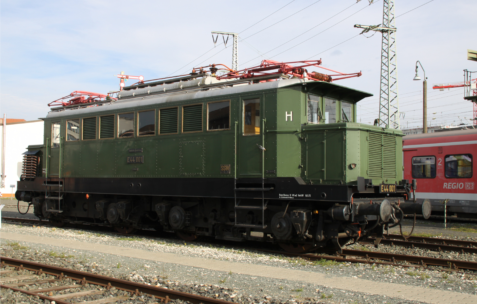 E44 001 im Freigelände des DB-Museums Nürnberg